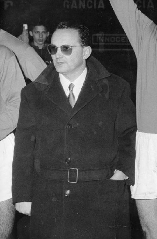 Edmondo Fabbri en 1962